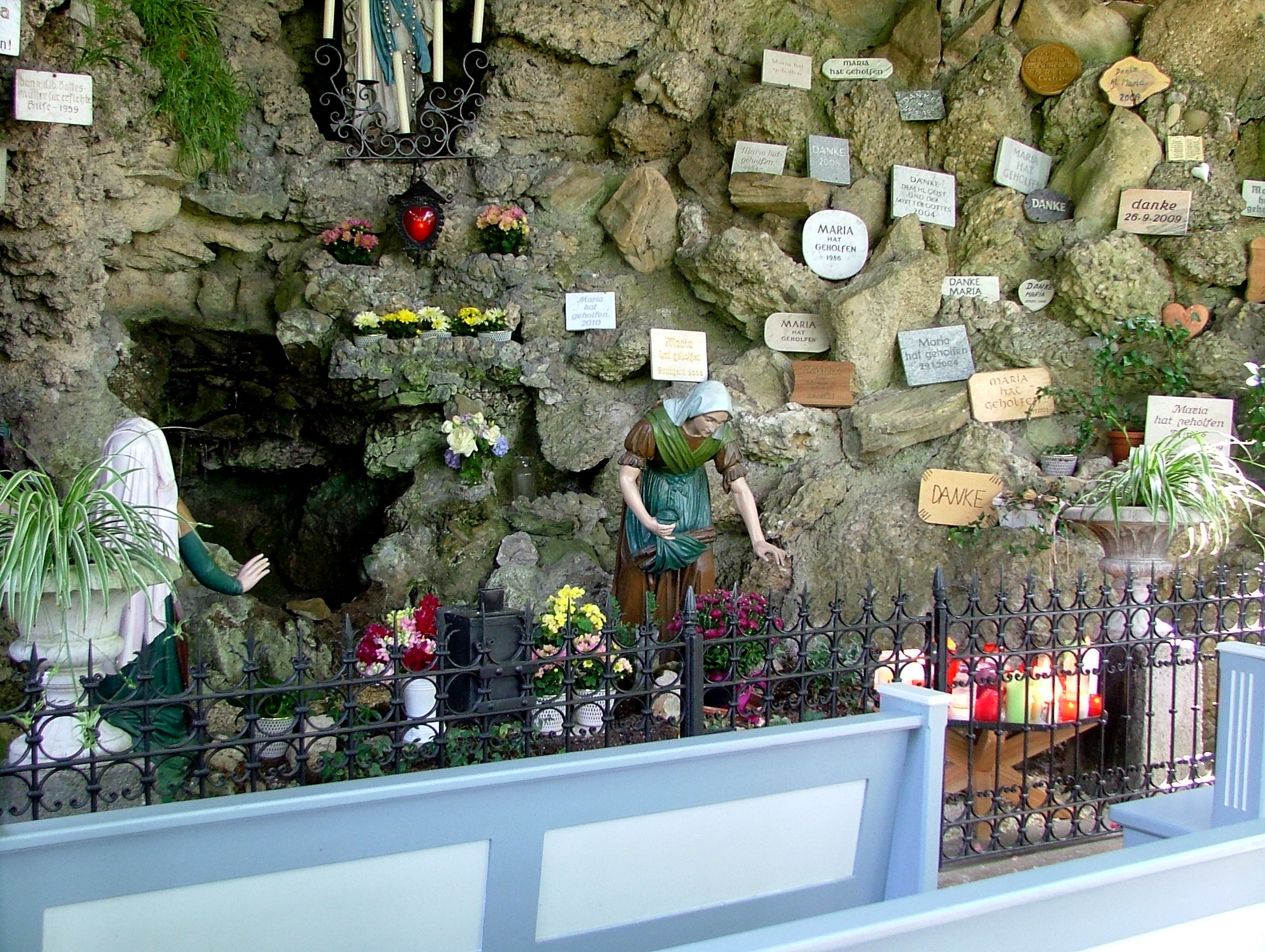 Lourdeskapelle von 1901